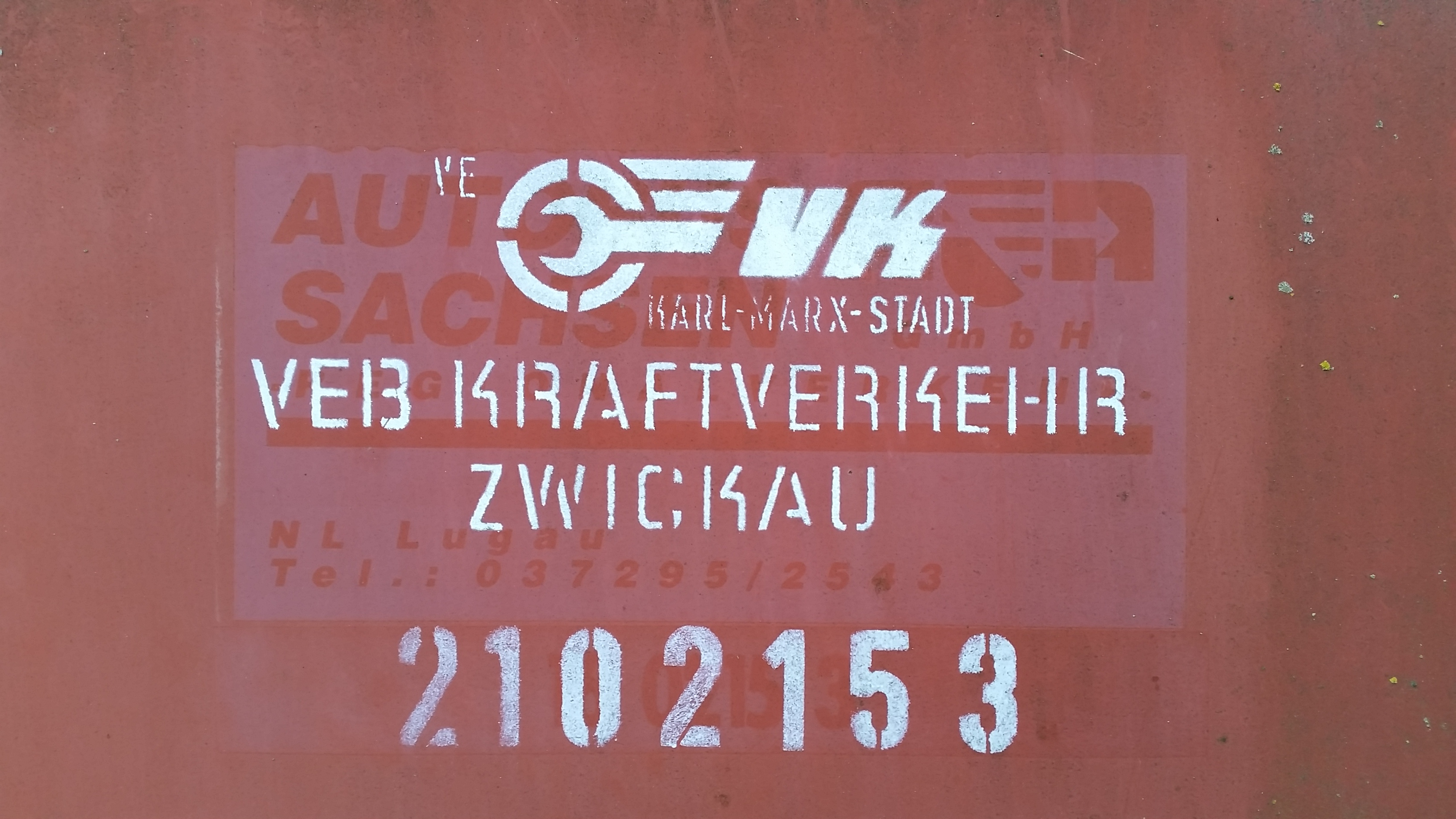 Fahrzeugbeschriftung auf einem IFA W50 LA - Abschlepp- und Bergungsfahrzeug der VEB Kraftverkehr Zwickau, IFA W50 LA